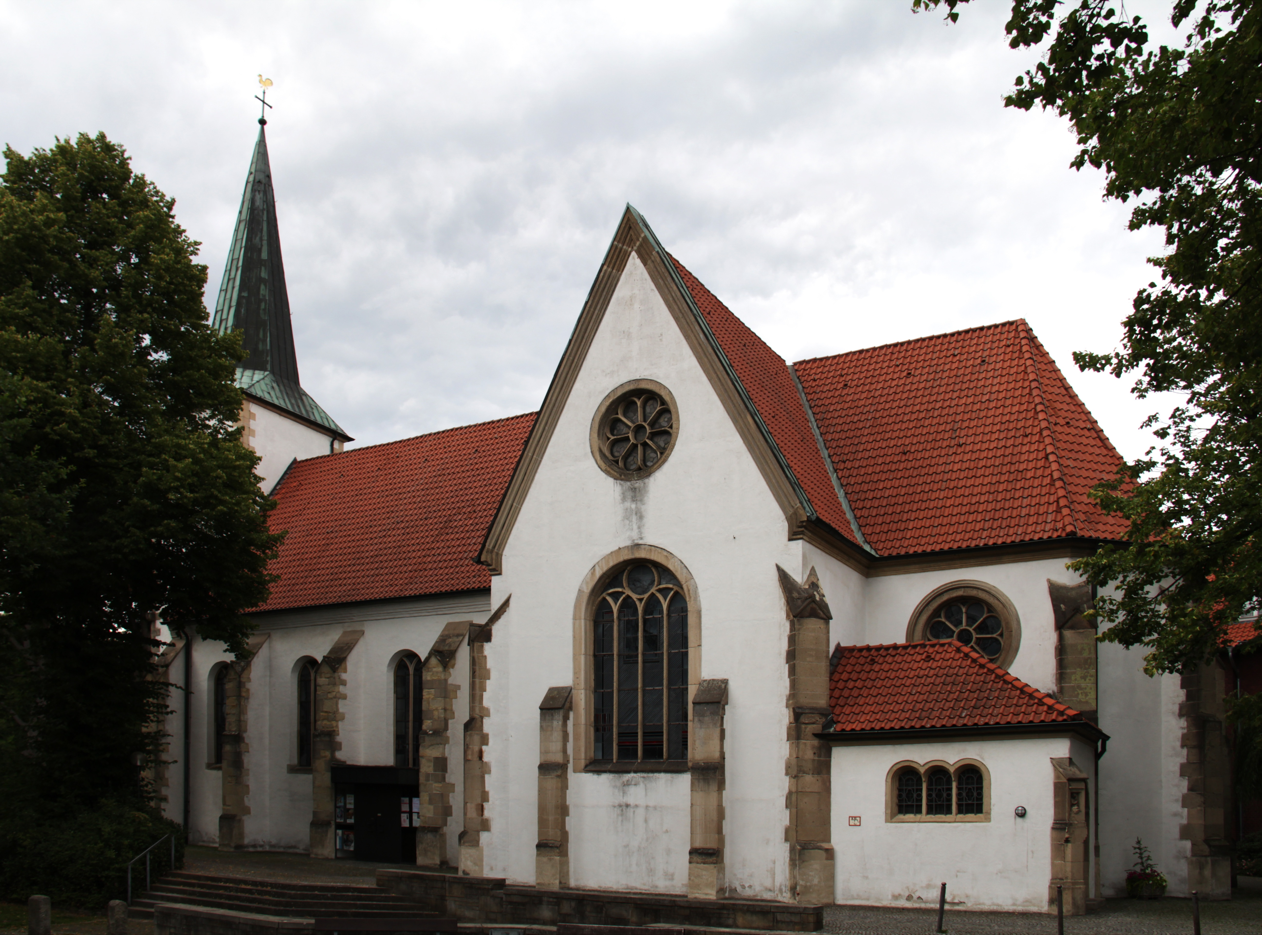 Kirche St. Petronilla in Münster/westfalen, Stadtteil handorf